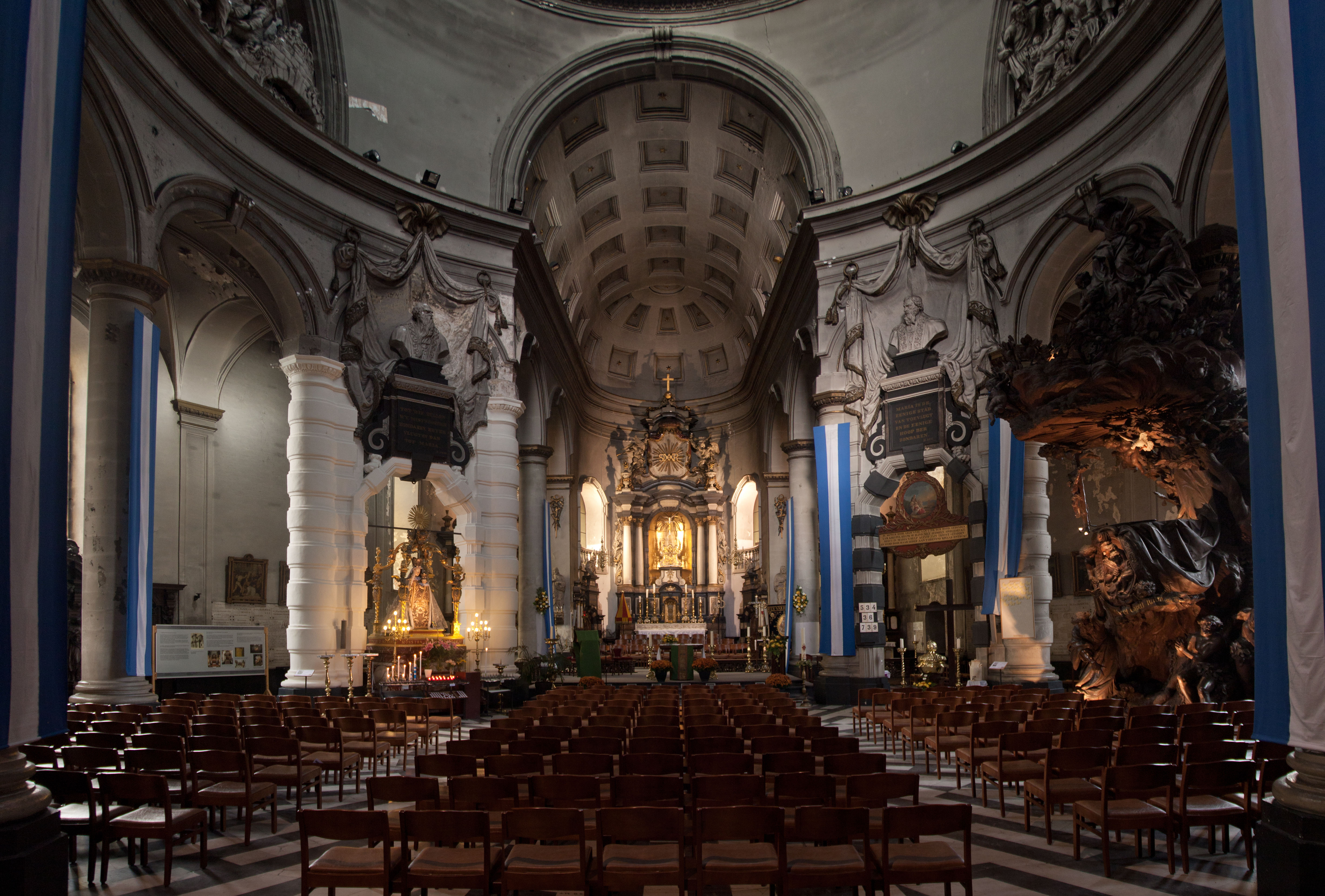 Parochiekerk Onze-Lieve-Vrouw van Hanswijk, Mechelen.